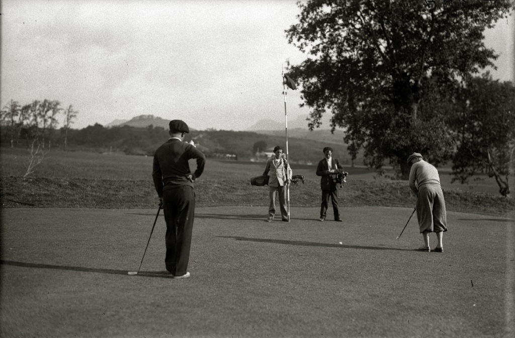 Título original: Competición de golf en Lasarte (6/11) Localización: Lasarte-Oria (Guipúzcoa)